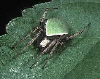 female Neoscona mellotteei from Okinawa.